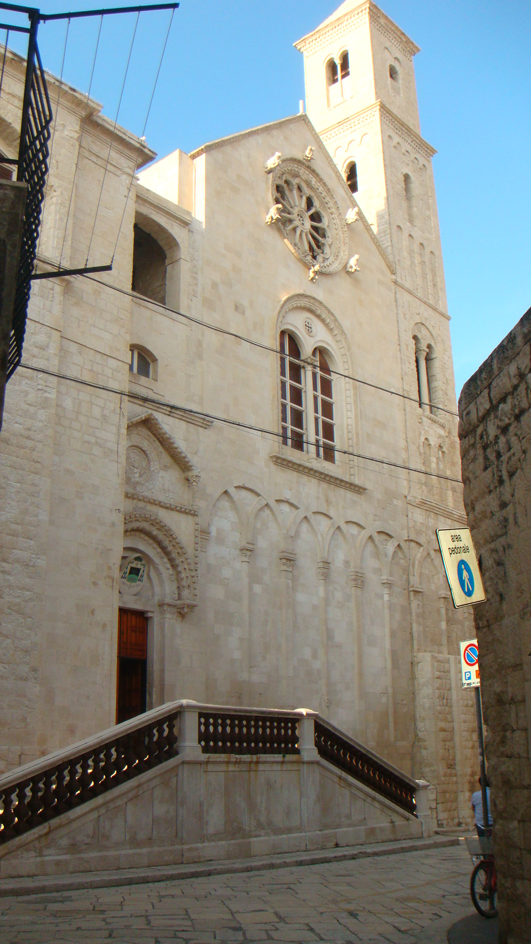 rasky, opera propria, Cattedrale di Giovinazzo